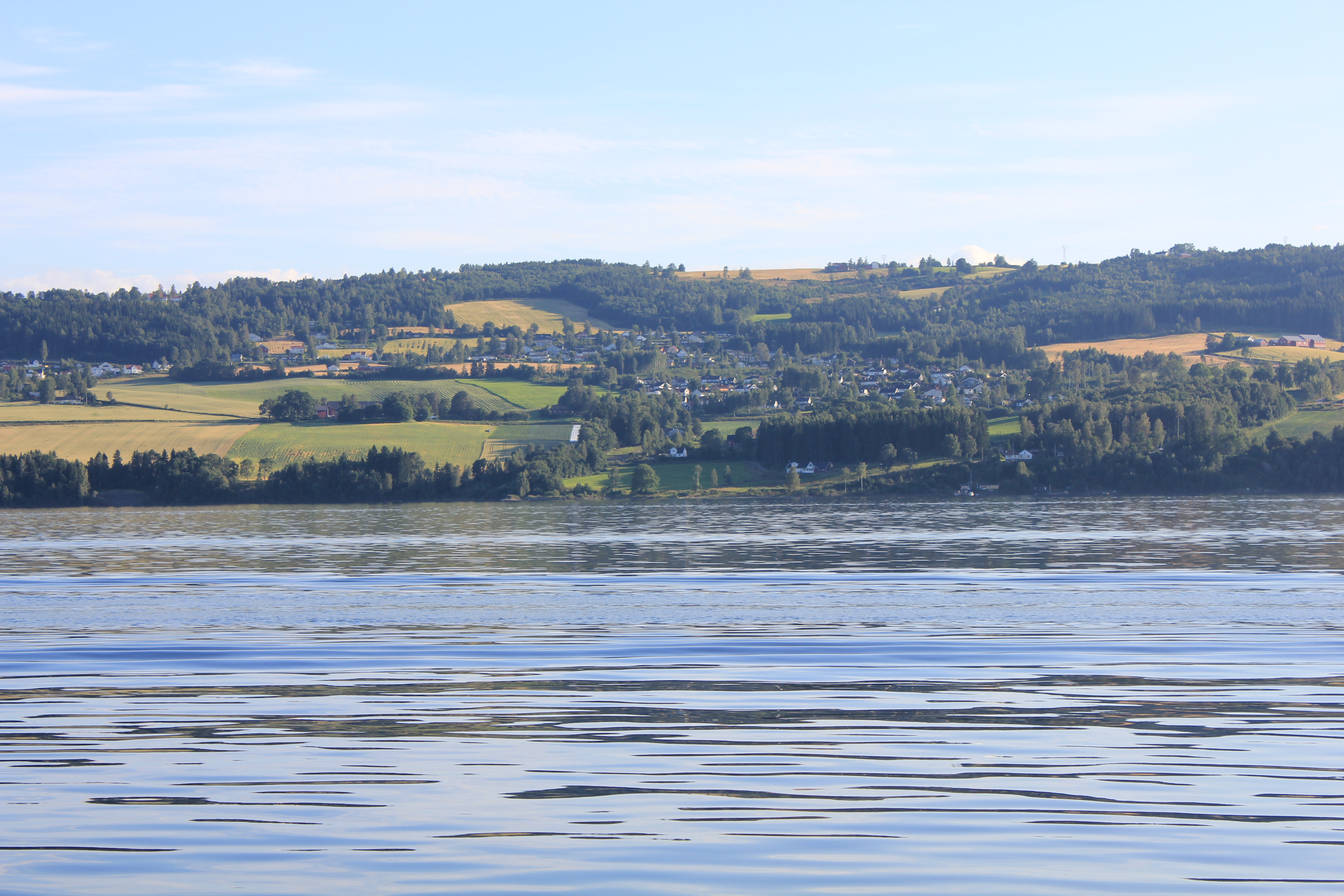 Nordlia tettsted på Østre Toten.